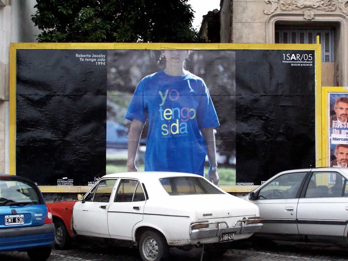 Obra de Roberto Jacoby para la 1SAR05